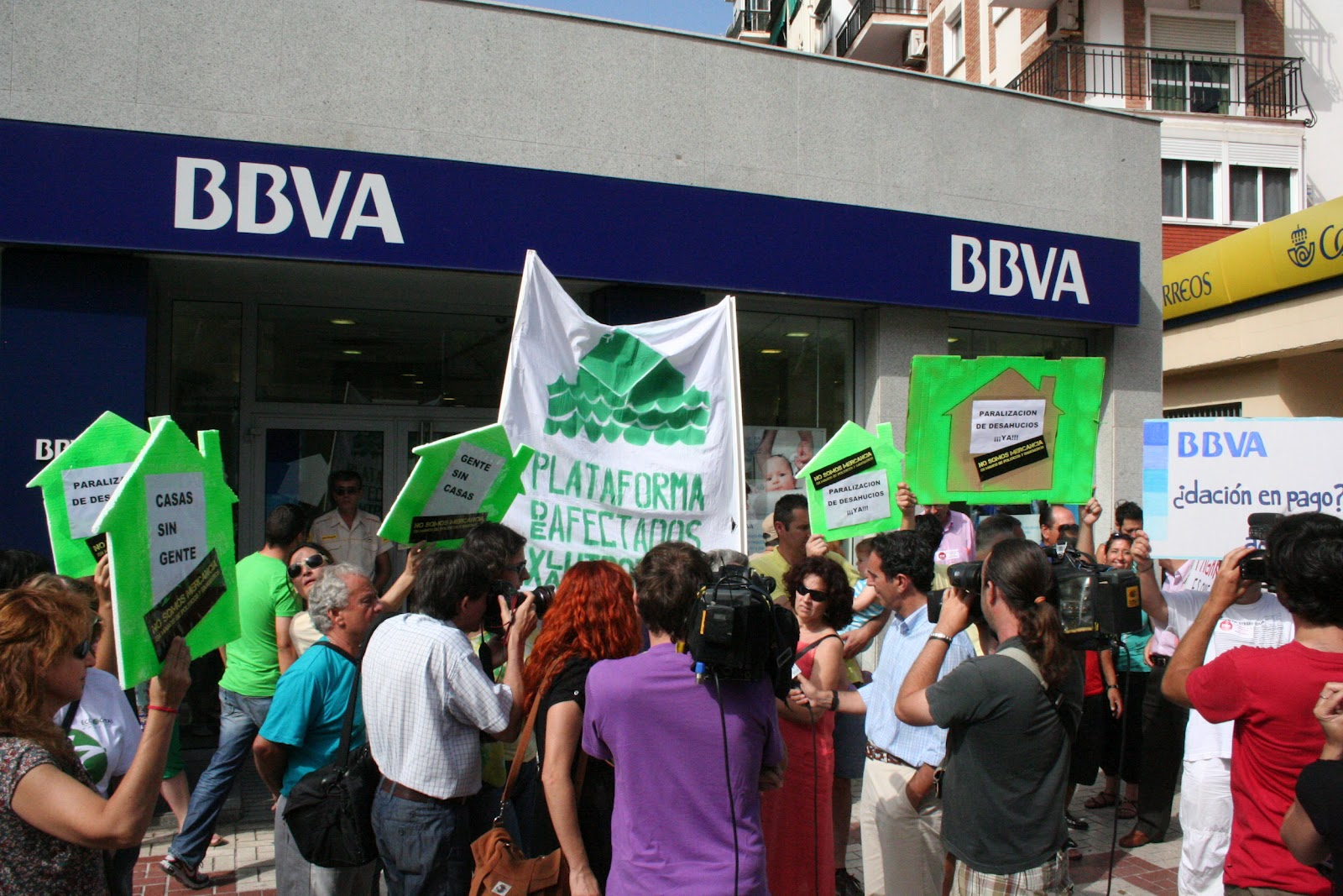 Acción de protesta ante una sucursal del BBVA en Málaga por la dación en pago de una familia.